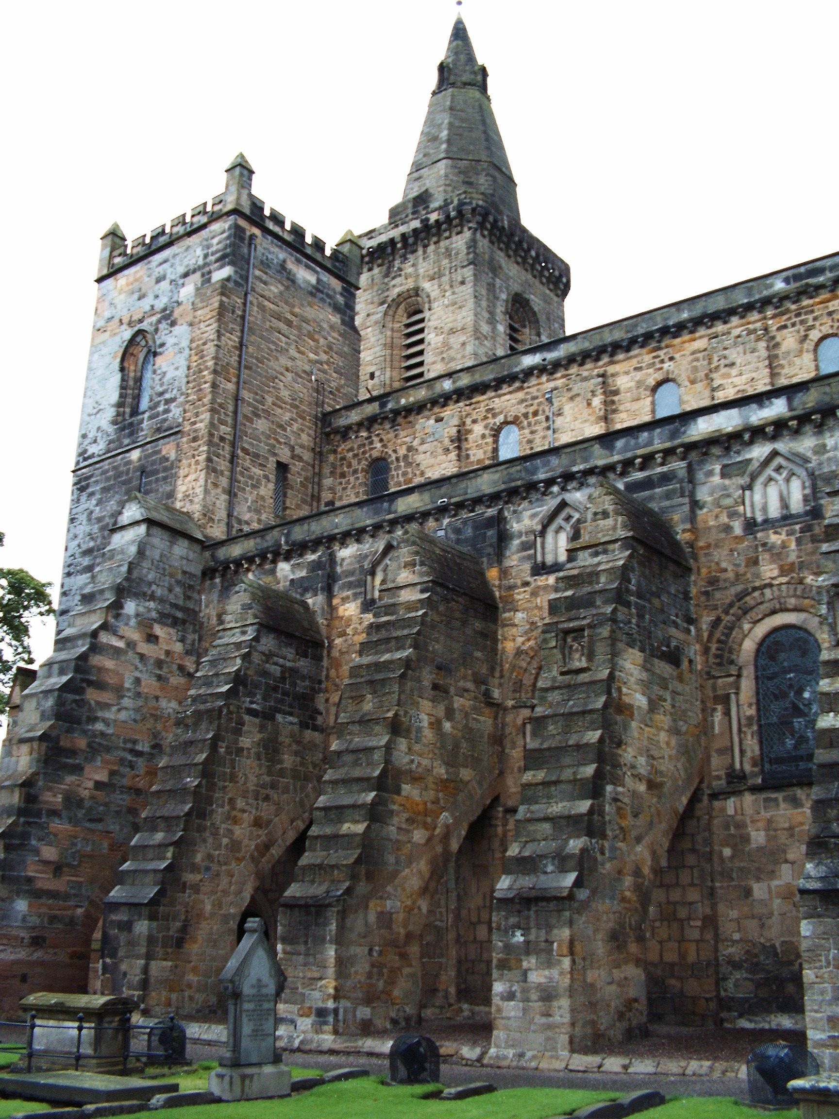 Dunfermline Abbey